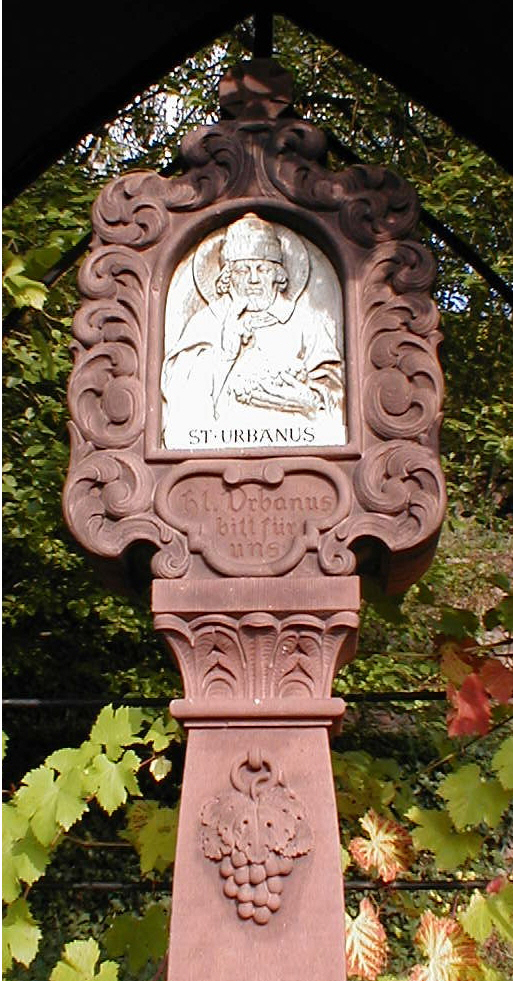 Bildstock Sankt Urban als Schutzpatron der Winzer, bei Klingenberg am Main, selbst fotografiert, GNU-FDL